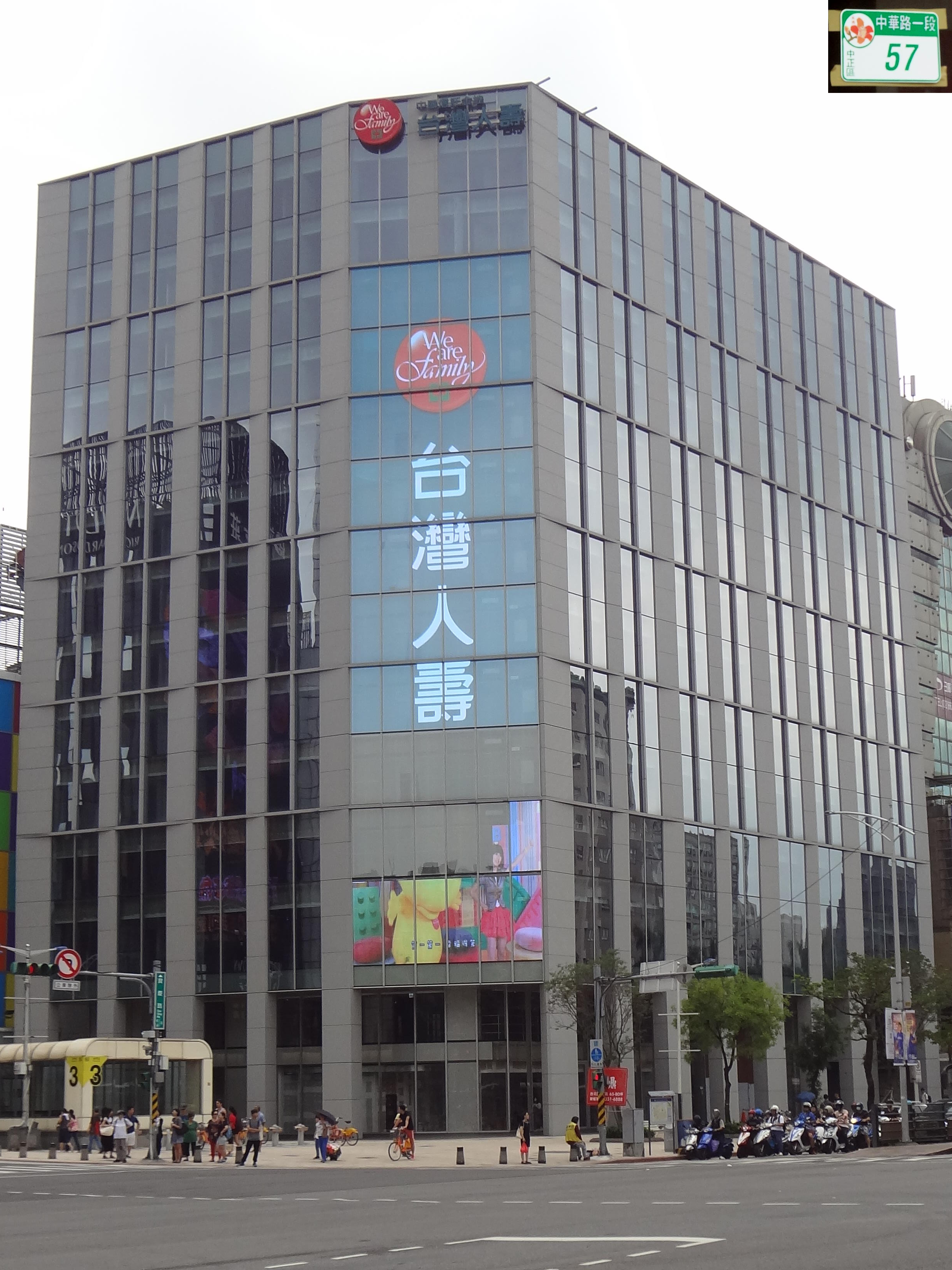 臺北市中正區中華路一段57號，大陸建設與台灣人壽興建中的寶慶路飯店案，外牆懸掛台灣人壽商標，外牆電視牆播放台壽阿龍電視廣告。